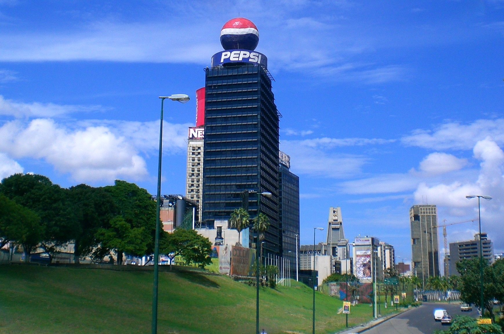 Plaza Venezuela, Caracas